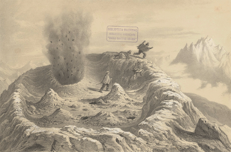 Ilustración del libro "Atlas de la historia física y política de Chile" de Claudio Gay, durante una visita a la cumbre del volcán Antuco al momento de una "erupción de gas".